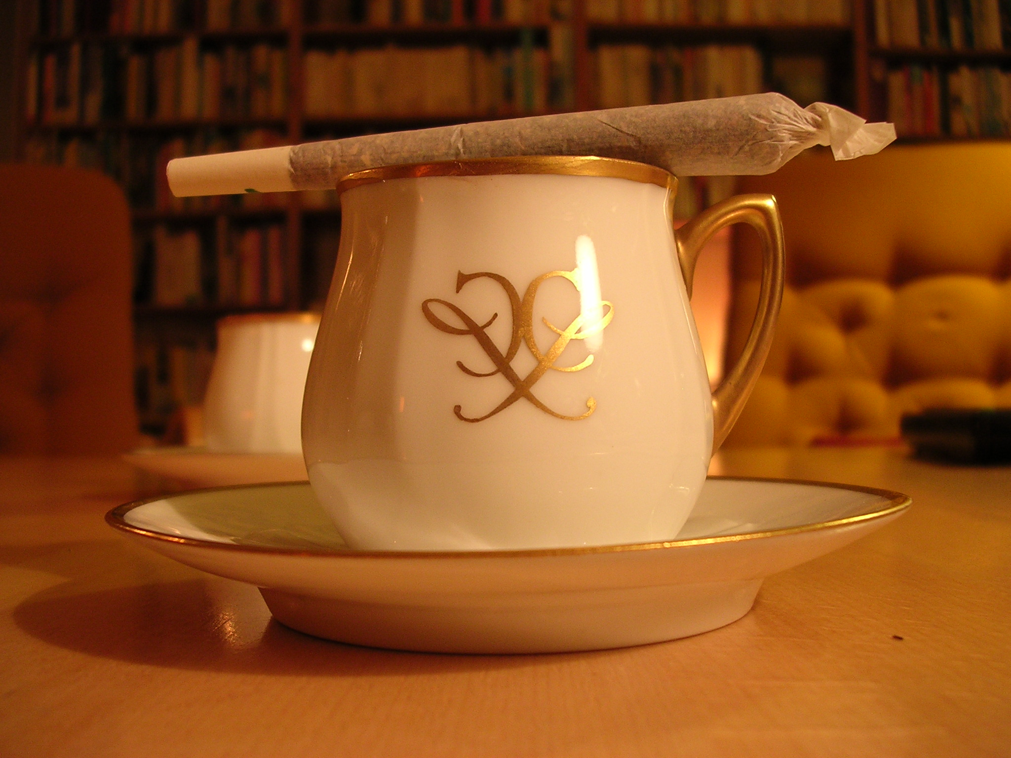 Kaffe og joint